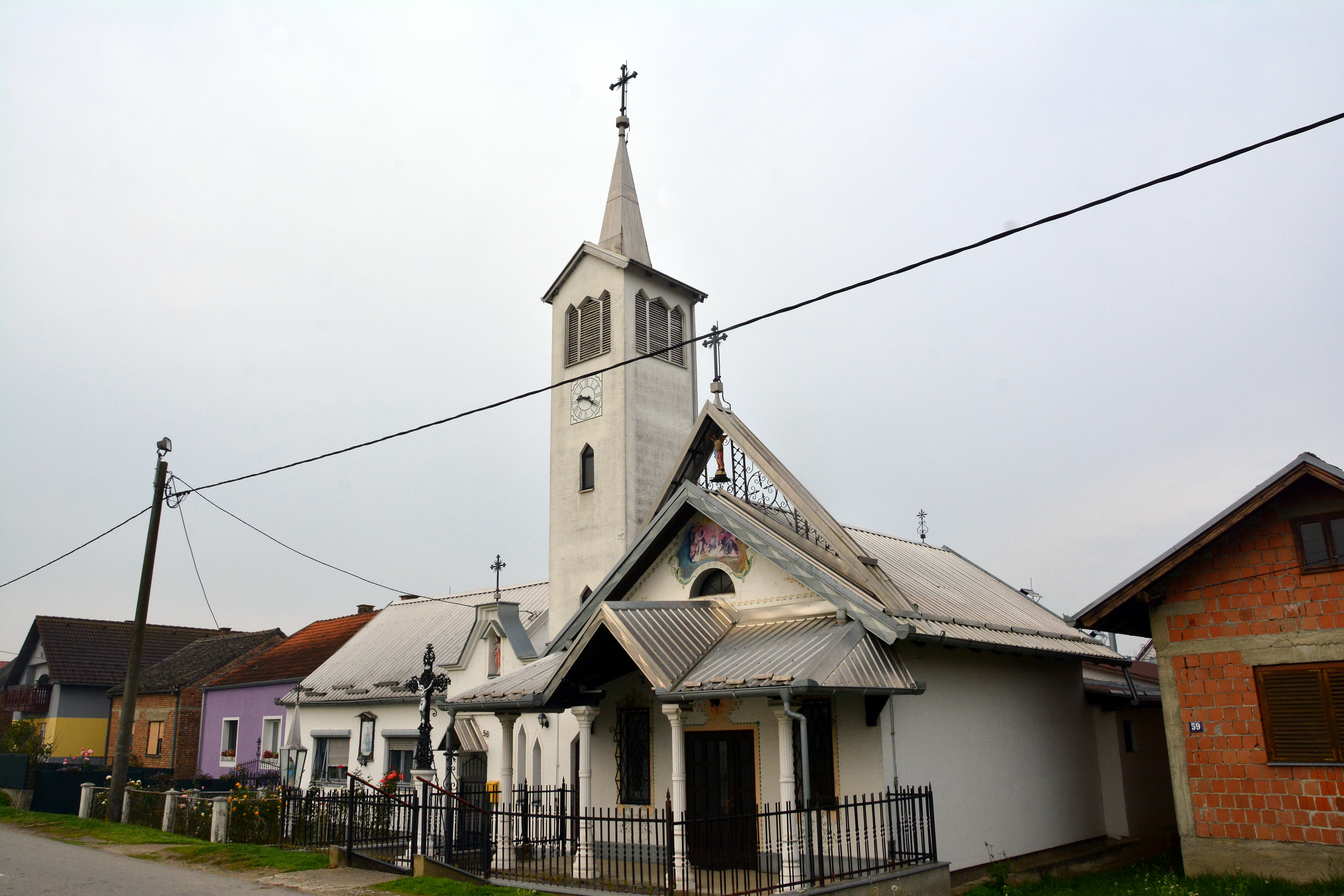 Kirche in Donji Varoš, einem Ort in der Gemeinde Stara Gradiška